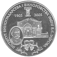 Монета присвячена 100-річчю заснування Інститута виноградарства та виноробства ім. В.Є.Таїрова: На монеті зображена будівля виноробні інституту та портрет В.Є. Таїрова; номінал - 2грн.; метал - нейзильбер; маса - 12.8г; діаметр - 31мм; Якість карбування - спеціальний анциркулейтед; гурт - рифлений; Тираж - 20 000